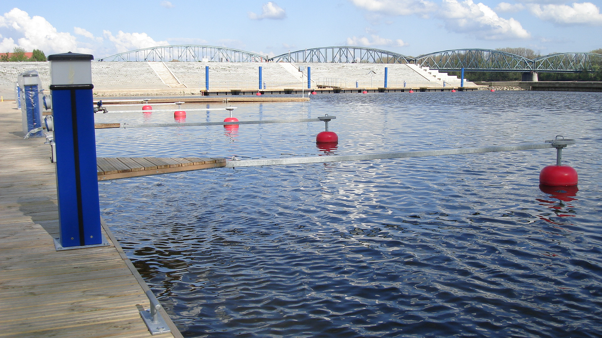 Przystań AZS Toruń